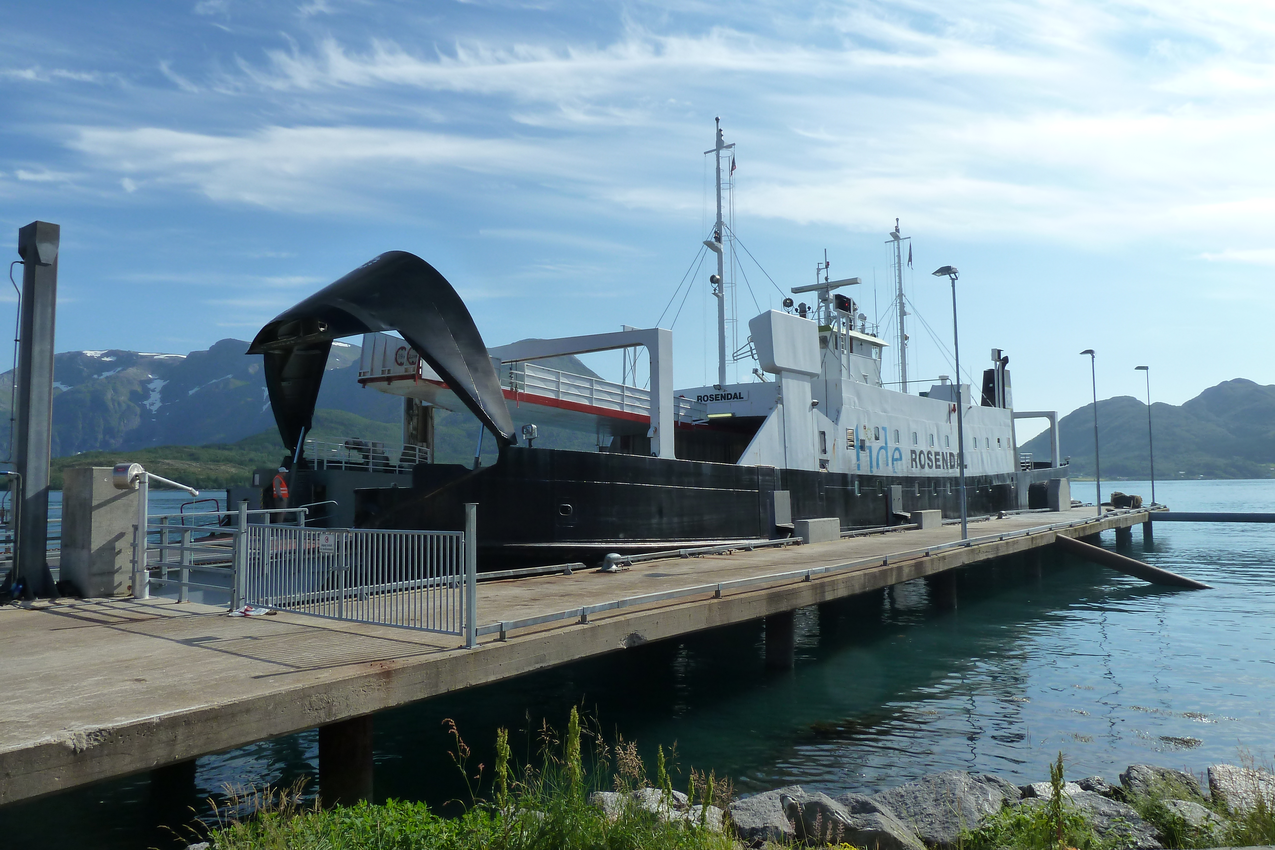 MF Rosendal (IMO 7405936) til kai i Forøy, Meløy.